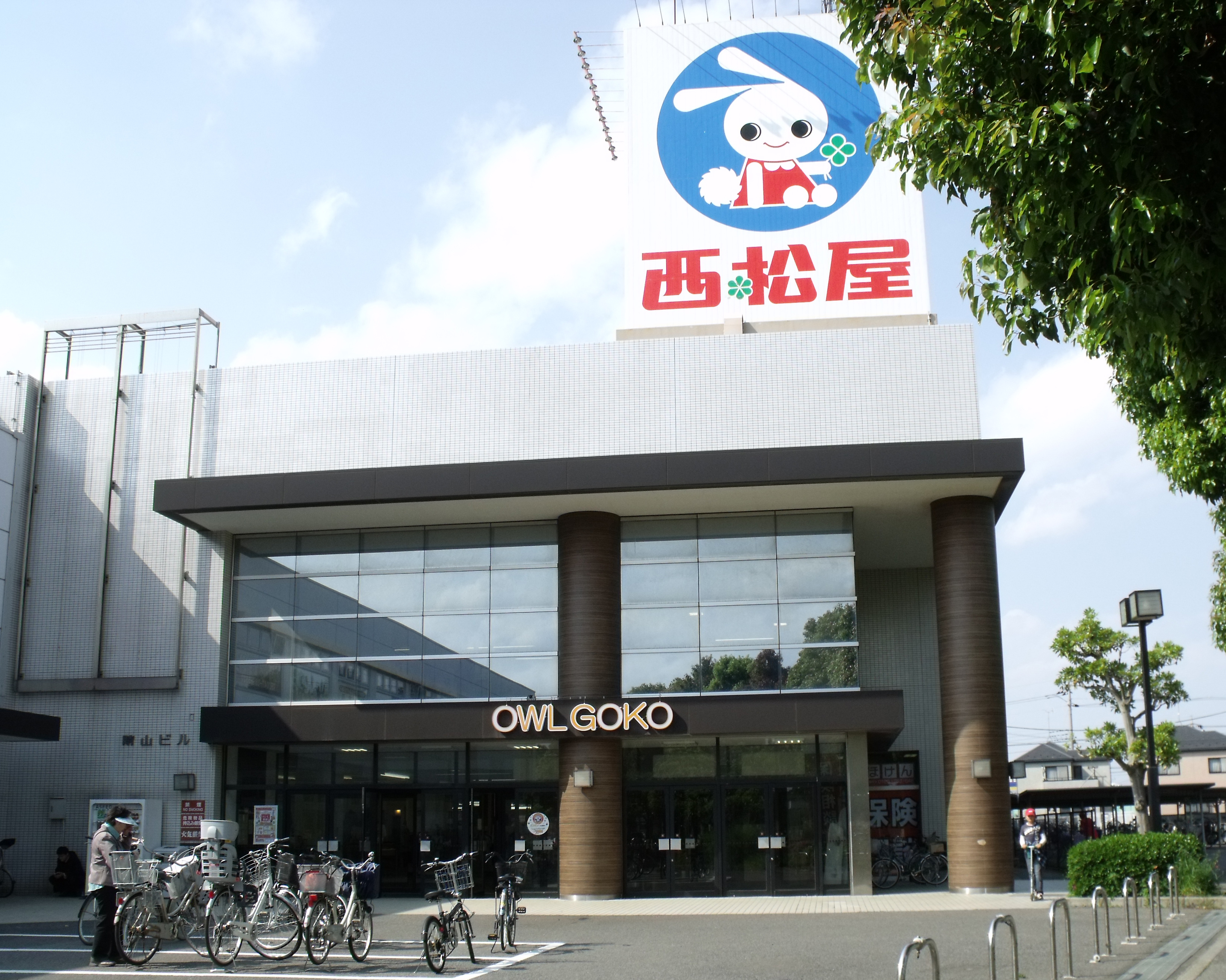 千葉県松戸市のショッピングセンター、オウル五香